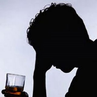 español